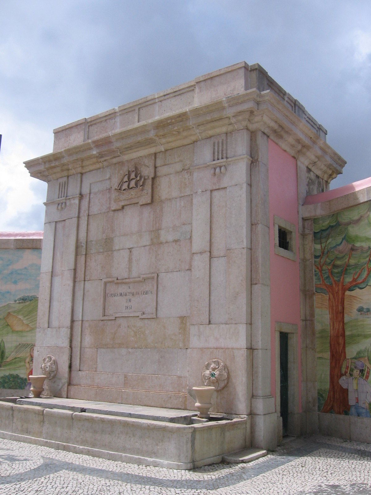 Chafariz de Entrecampos, rua de Entrecampos, Lisboa, Portugal